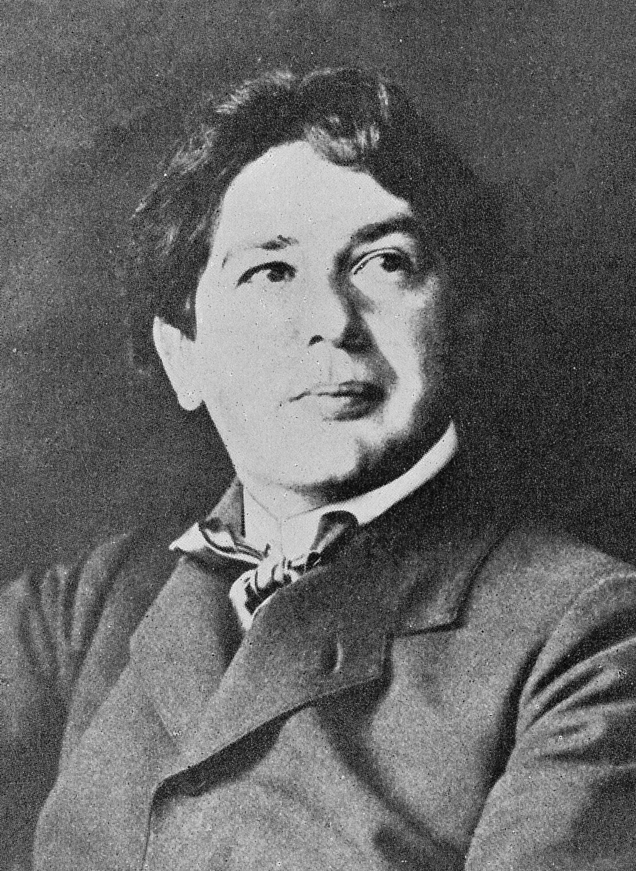 Alfred Frohlich